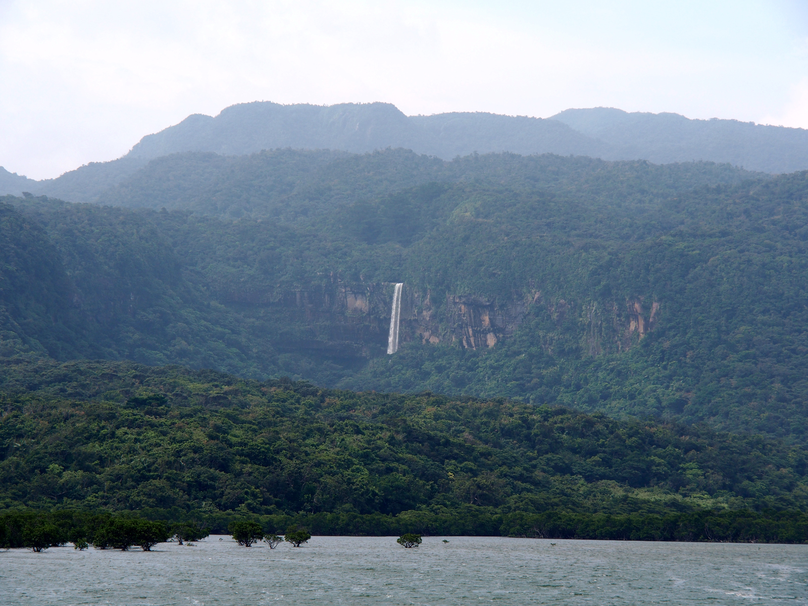 ピナイサーラの滝（沖縄県八重山郡竹富町/西表島）